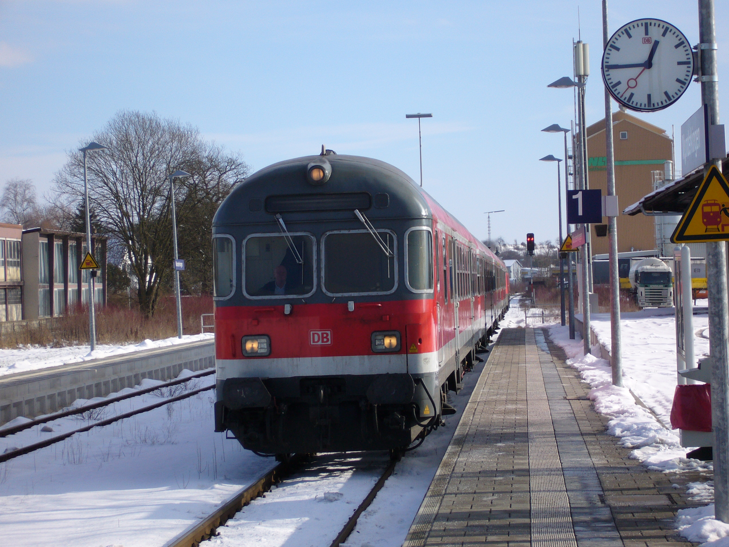 Regionalexpress auf der Donautalbahn bei der Einfahrt in den Bahnhof Munderkingen